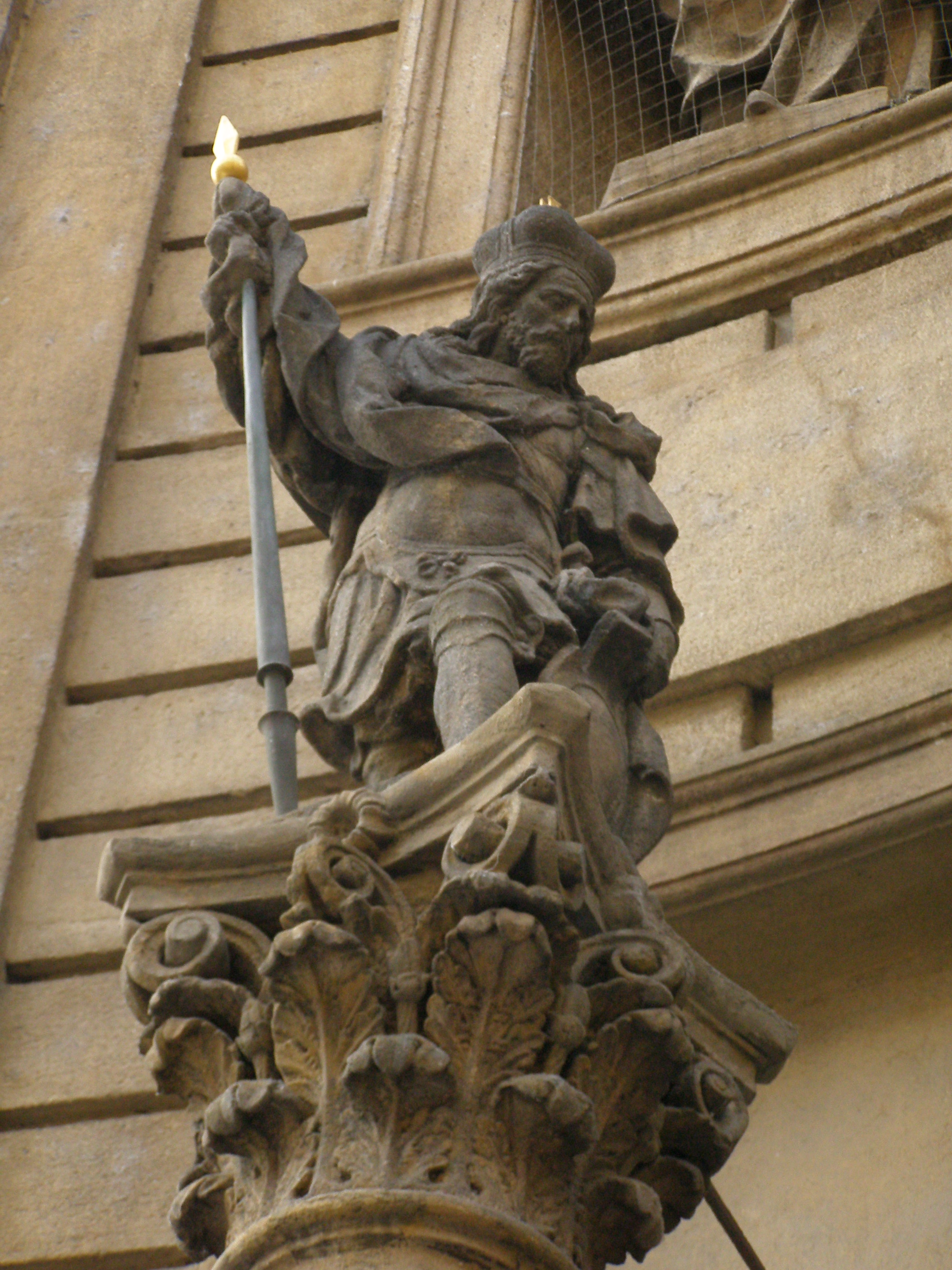 Praha 1-Staré Město, Křižovnické náměstí, vinařský sloup se sochou sv. Václava.